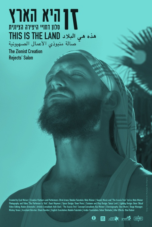 נטע וינר על פוסטר ההצגה "זו היא הארץ", מאת ובבימויו של אייל וייזר